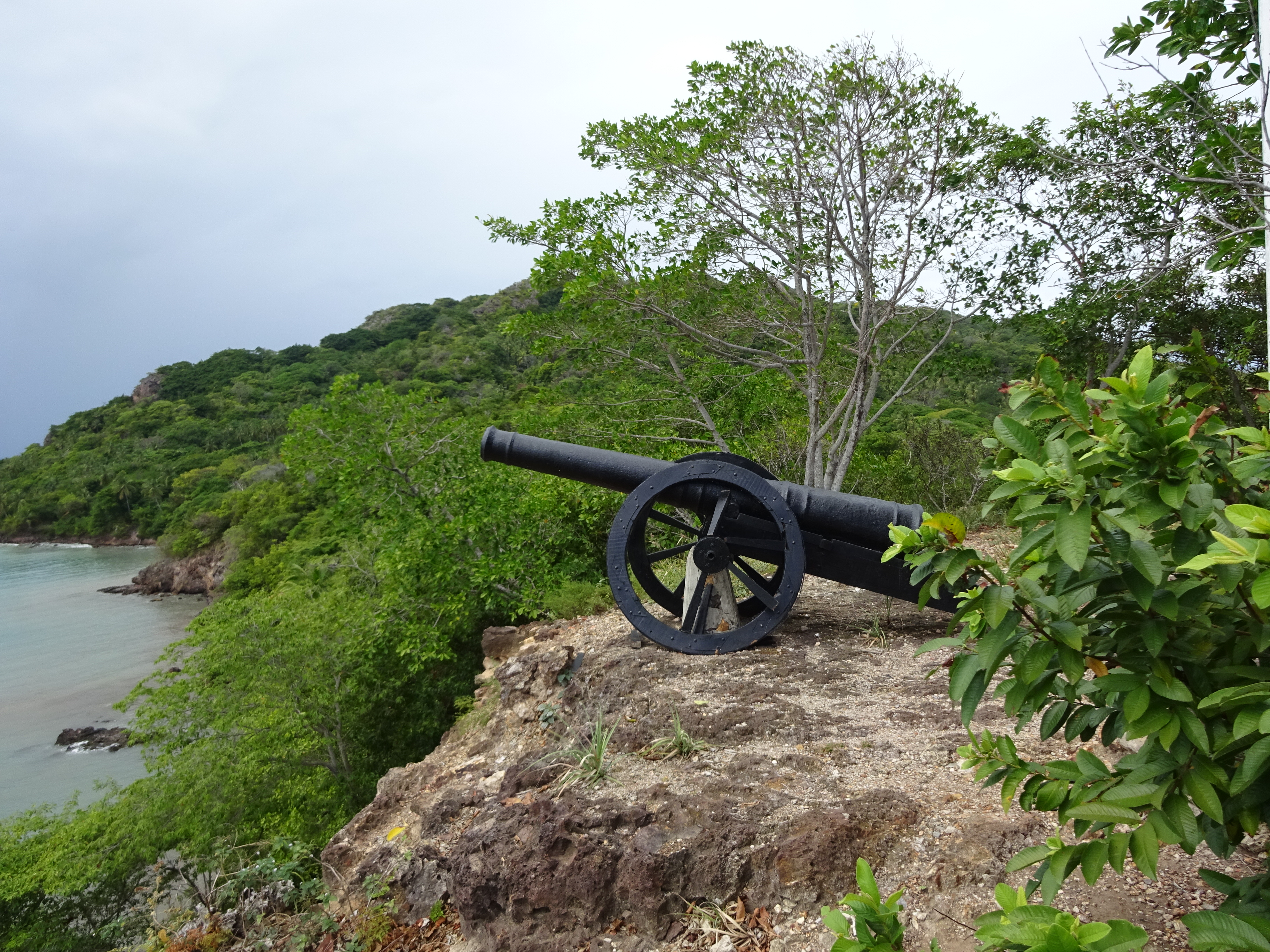 Uno de los dos cañones que existen en la isla de Santa Catalina, recuerdo de la época en que la isla era usada como refugio de piratas.